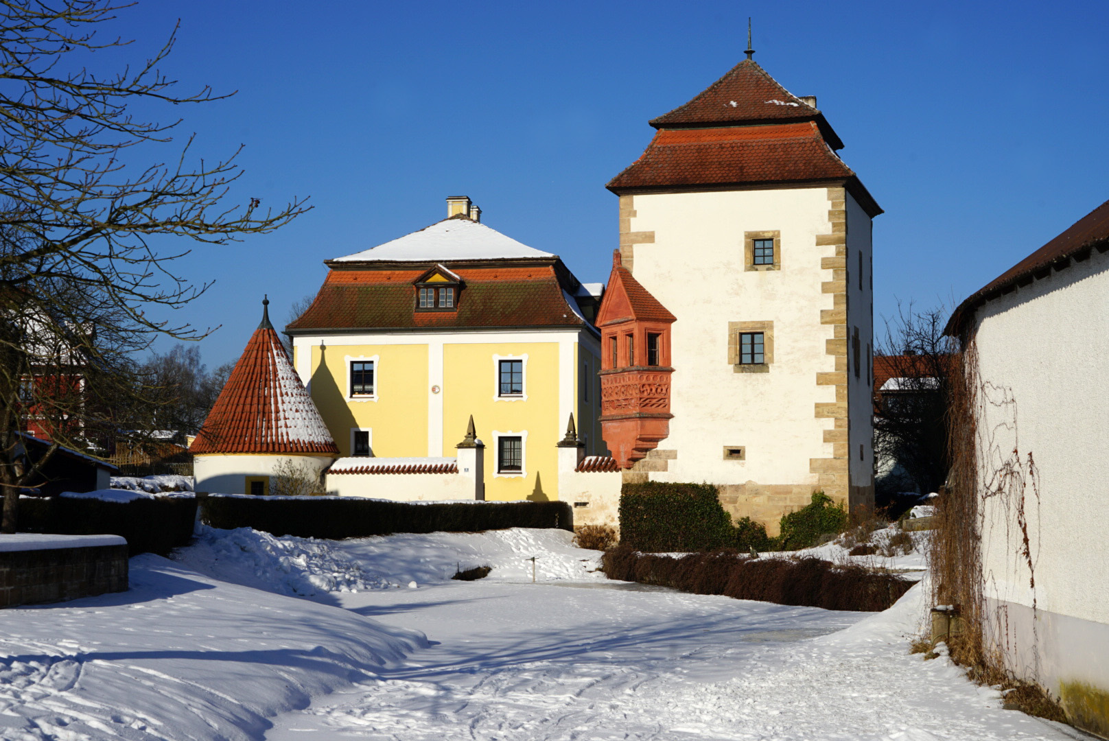 Das Hammerschloss in Dießfurt ist zu allen Jahreszeiten ein Hingucker.